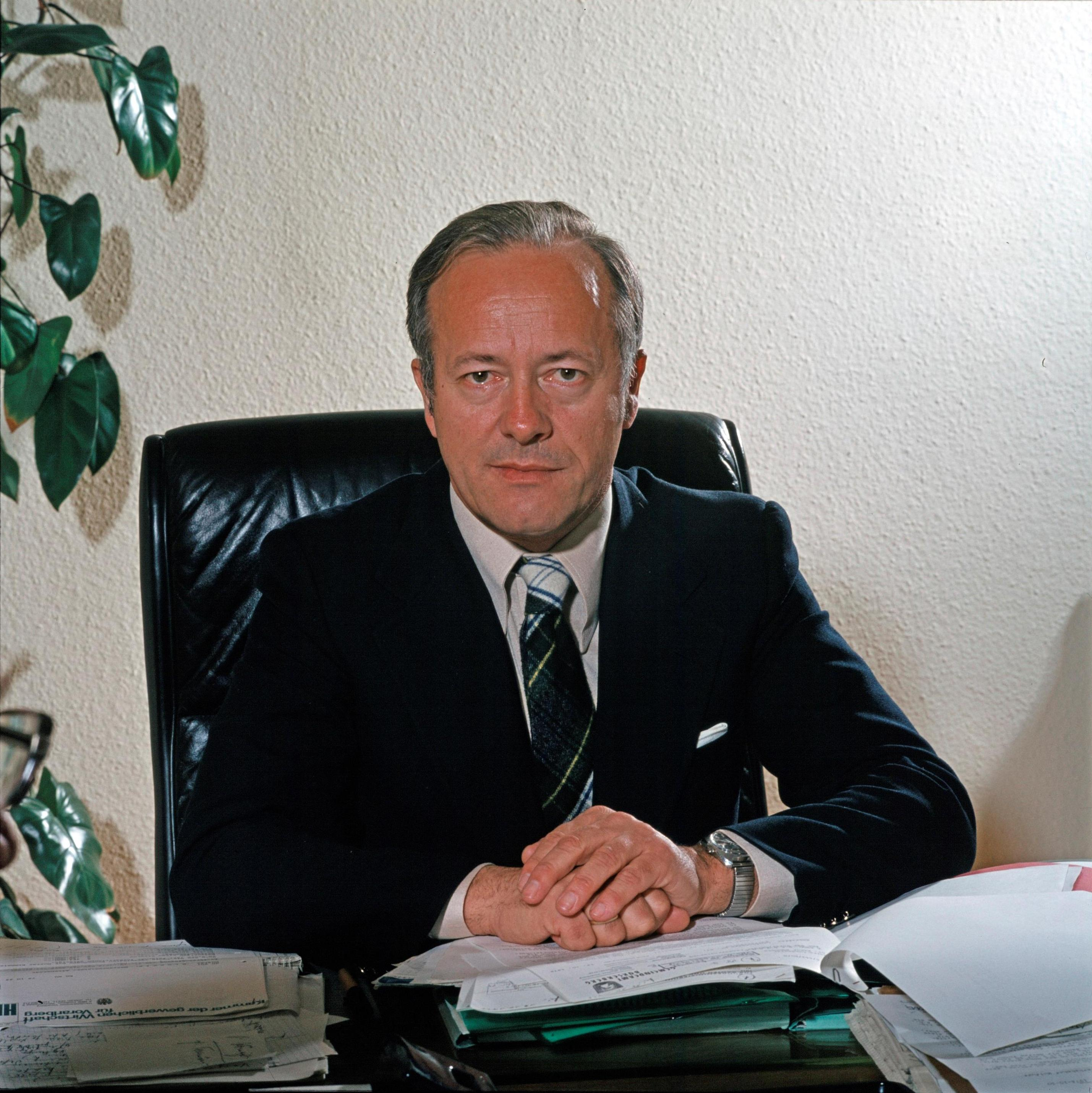 Elmar Rümmele war Landesrat in der Vorarlberger Landesregierung von 1974 bis 1984. Dies ist eine offizielle Portraitaufnahme aus dem Oktober 1978.